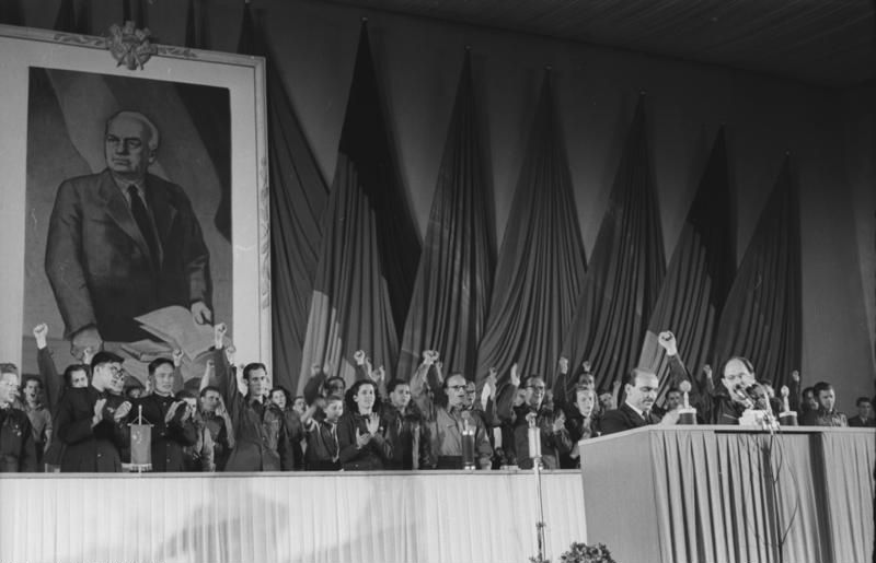 Zentralbild/Sturm 31.5.52 IV. Parlament der Freien Deutschen Jugend in Leipzig 1952 (30.5.52) UBz.: Franko Moranino, Kommandeur der 22. italienischen Partisanendivision und Mitglied des Politbüros der KP Italien, bei seiner Ansprache. Im Präsidium links aussen Mitglieder der chinesischen Delegation. Mitte Raymonde Dien, die tapfere französische Friedenskämpferin.